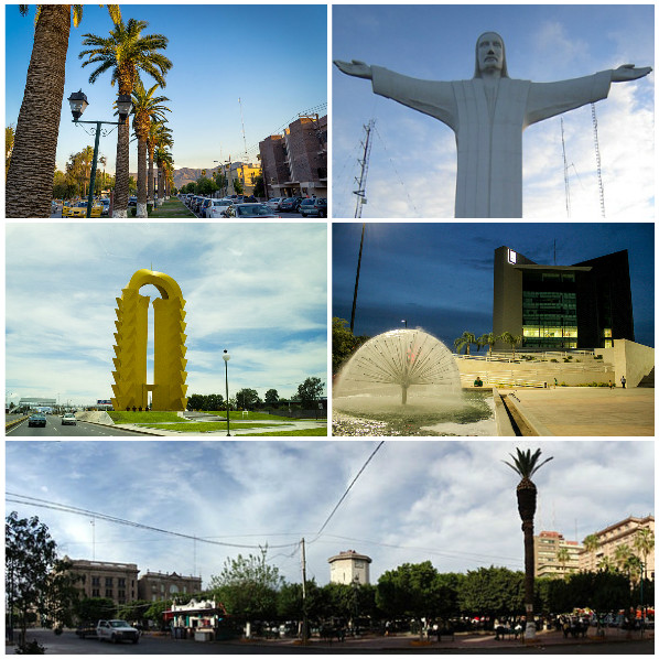 Collage de imágenes de lugares populares de la localidad mexicana de Torreón, Coahuila. De arriba a abajo de izquierda a derecha: Alameda Ignacio Zaragoza Cristo de las Noas Puerta de Torreón Plaza Mayor Plaza de Armas en el Centro Histórico